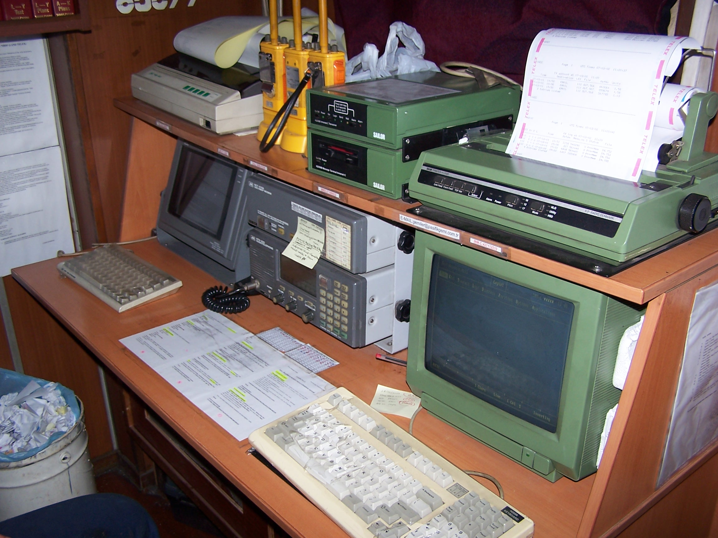 Photographie du poste de télétransmission du Tamer Kiran. Le Tamer Kiran est un navire cargo polyvalent sorti des chantiers navals turcs Gemak en 1983. Il est la propriété du groupe Kiran, basé à İstanbul, et navigue sous pavillon turc.